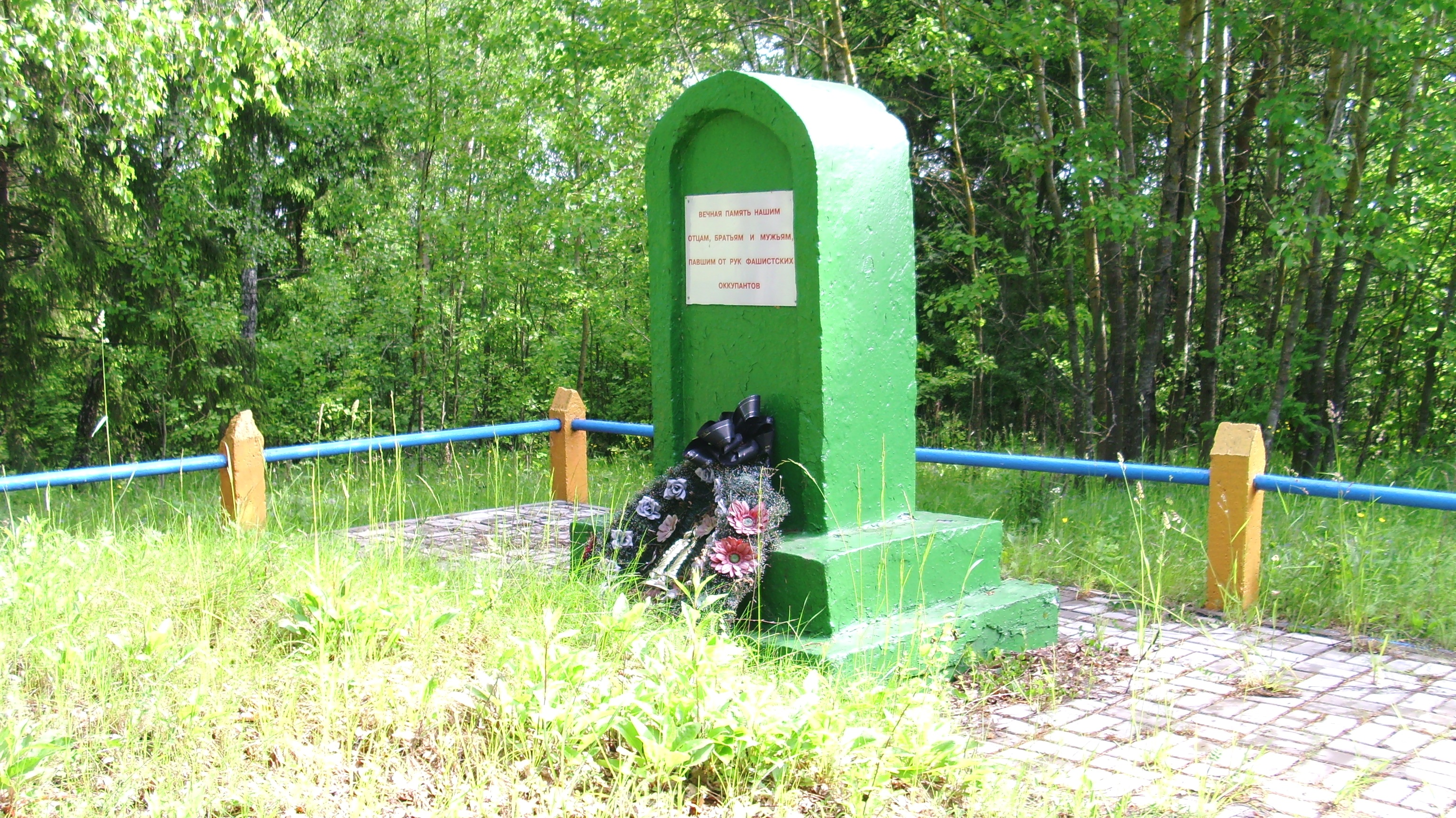 Памятник убитым во время Холокоста евреям у деревни Ягеловщизна Жупранского сельсовета Ошмянского района в урочище Люговщина (или Бартели). Установлен в 1958 году.